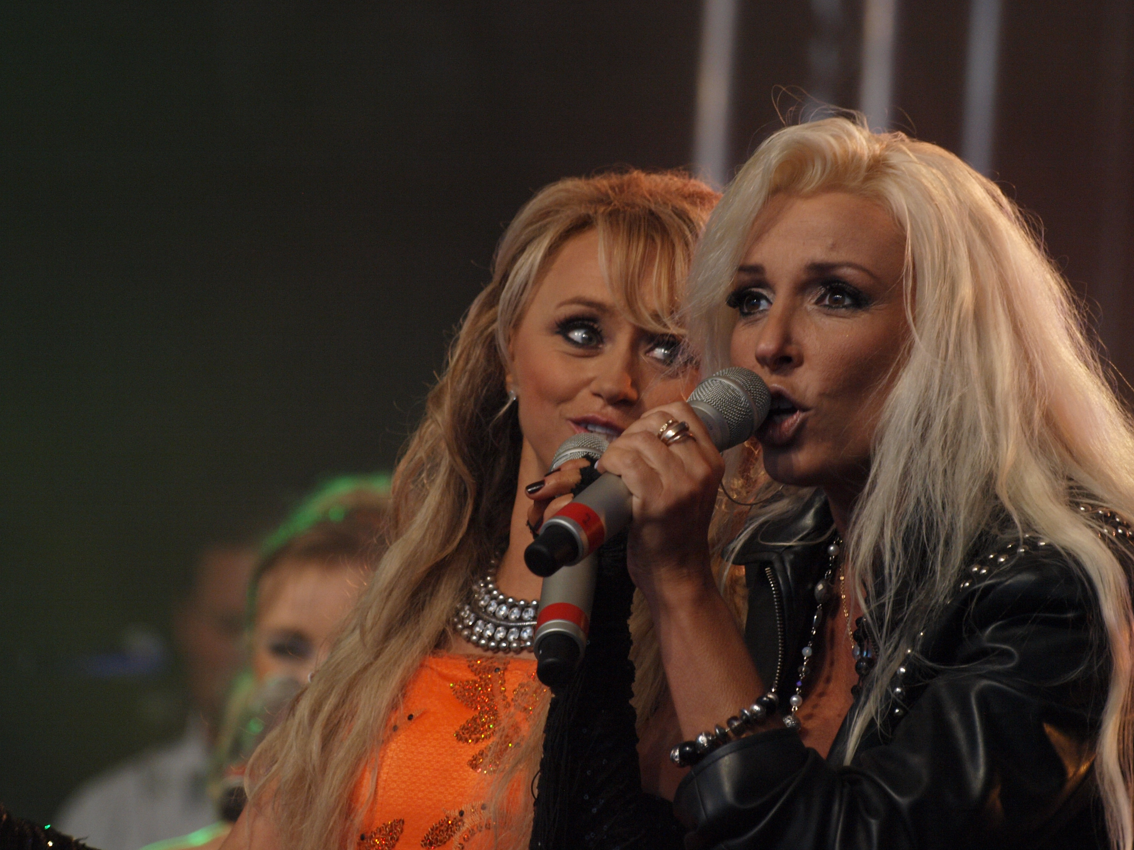 Nanne Grönwall and Angelique Widengren at Stockholm Pride 2010.